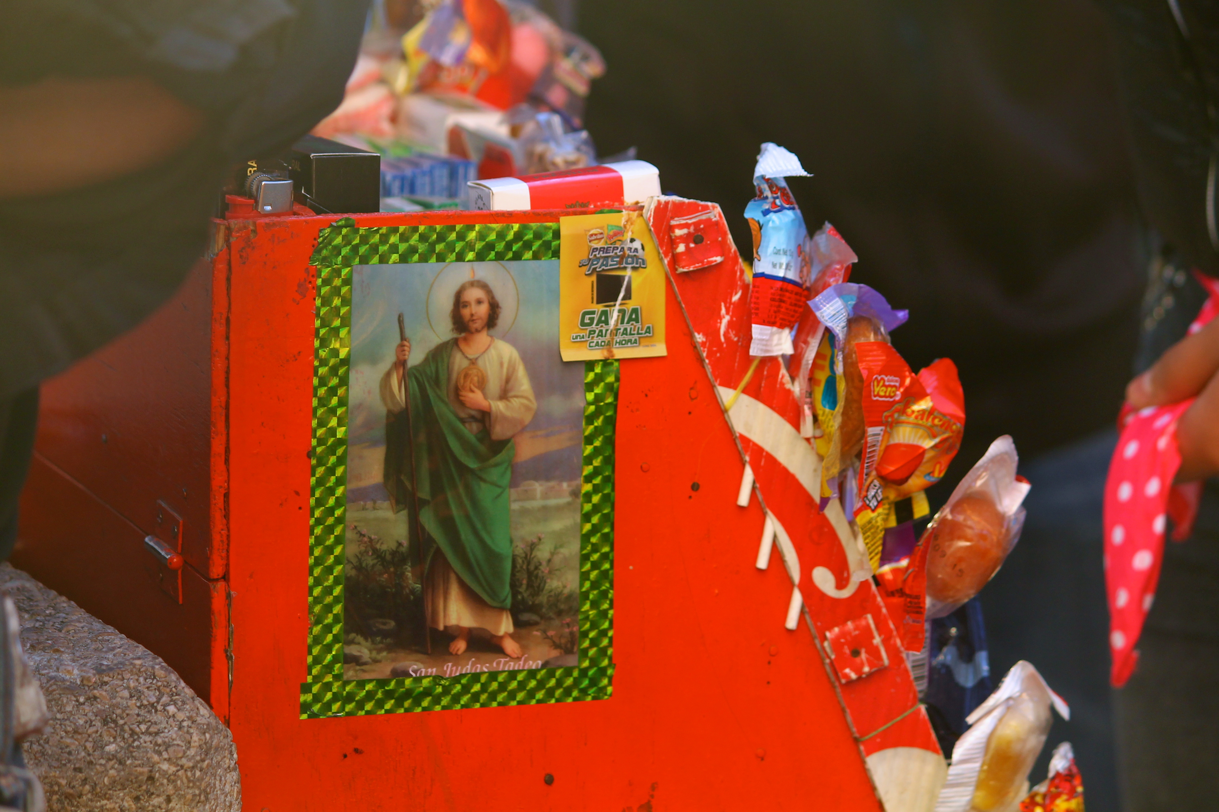 Folklore de la vida cotidiana de San Cristobal de las Casas, Chiapas.